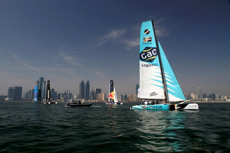 青岛浮山湾